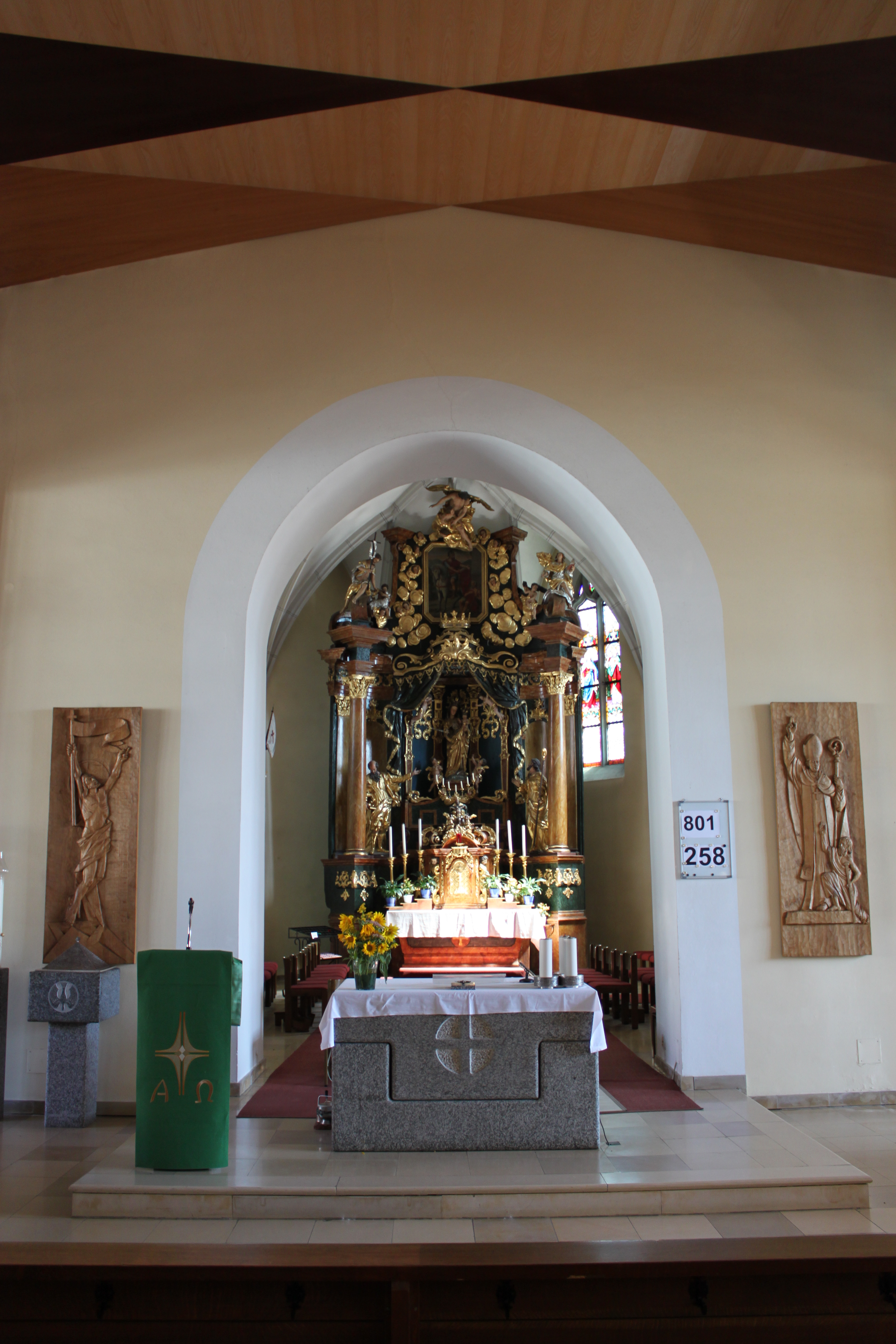 Presbyterium der Pfarrkirche Grafenschlag